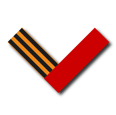 Антиоранжевая лента - Красная и георгиевская ленты. Символ митинга на Воробьёвых горах движения СУТЬ ВРЕМЁН